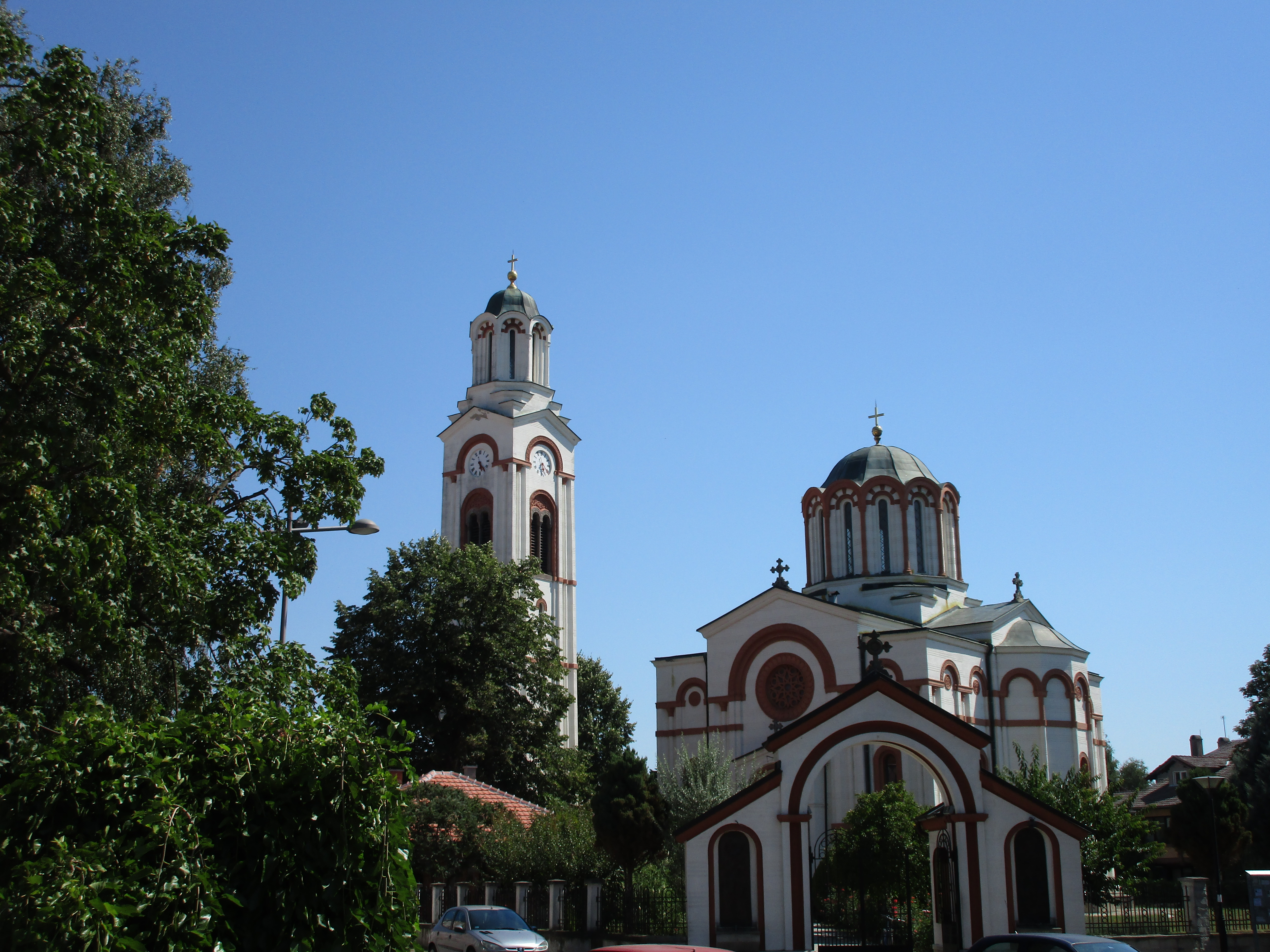 Srpski (latinica): Crkva Svete Trojice, Trstenik